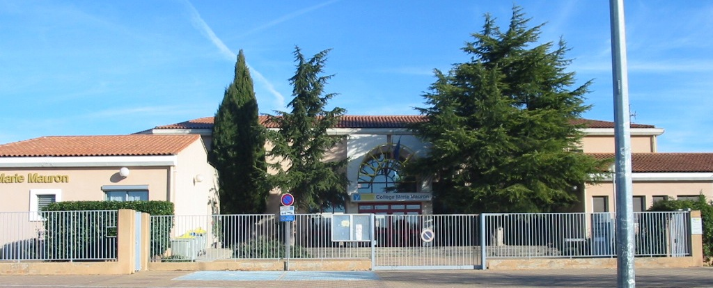 Collège Marie Mauron Pertuis